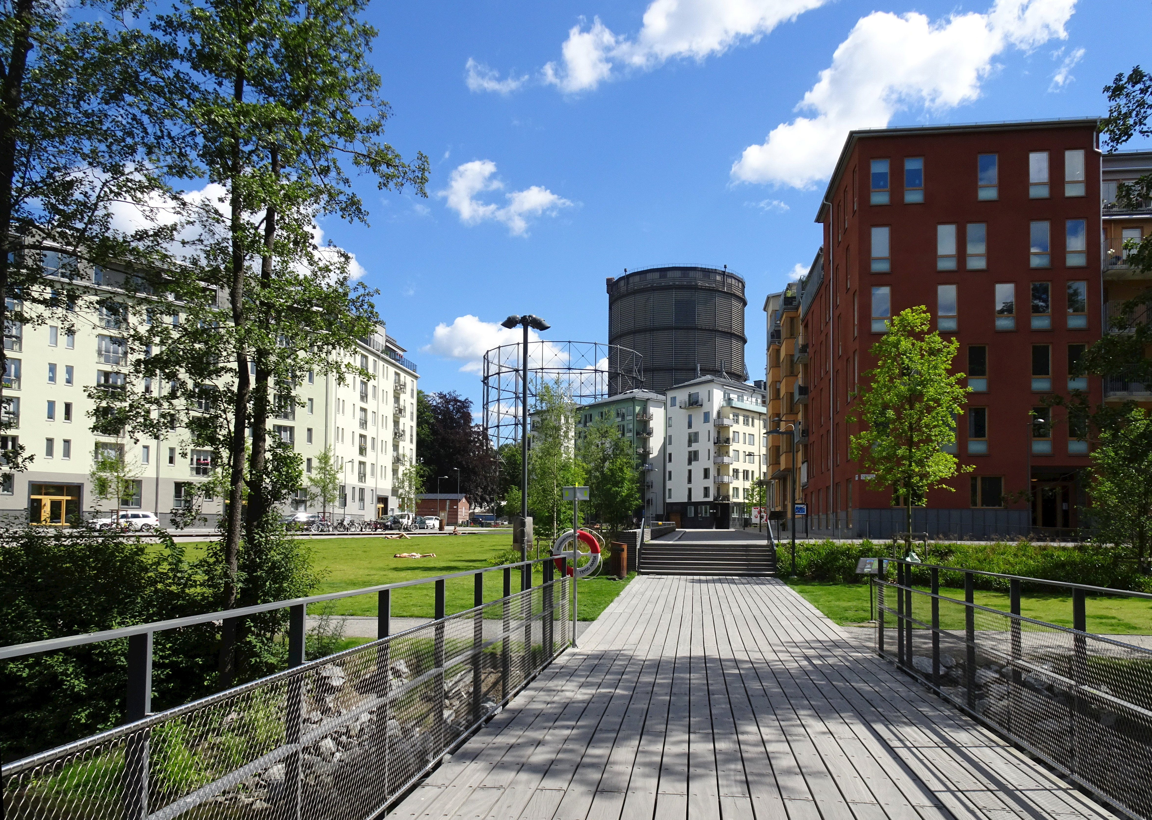 Norra Djurgårdsstaden vid bro över Husarviken